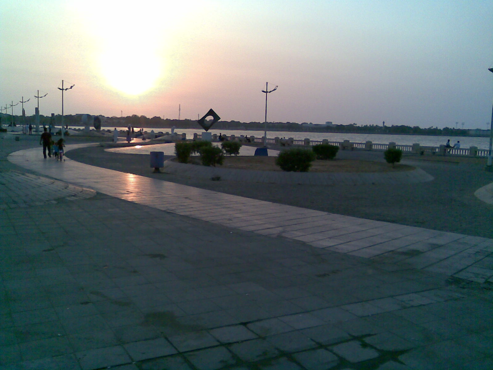 ജിദ്ദ ബീച്ചിലെ ഒരു സായാഹ്ന കാഴ്ച